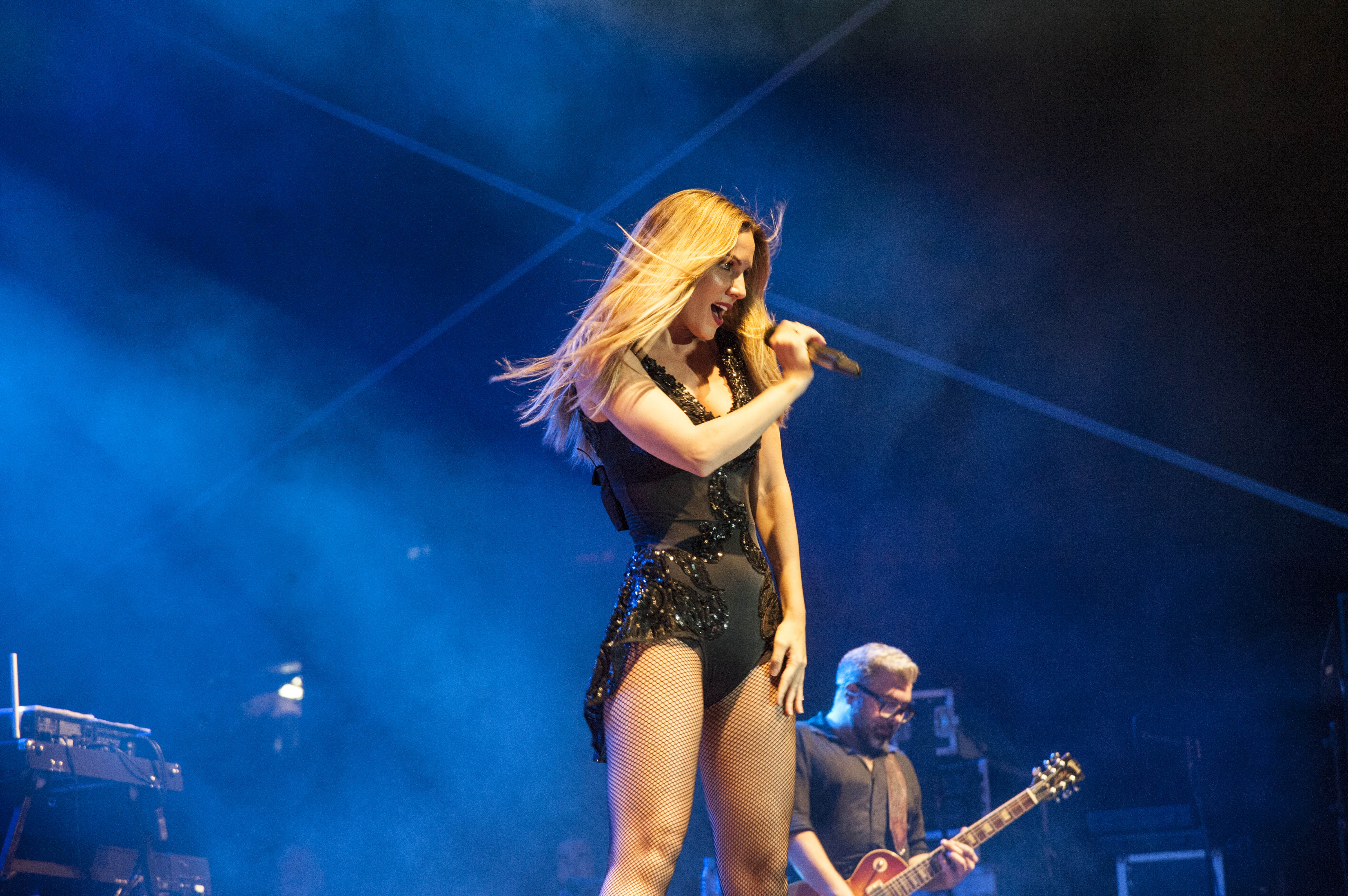 Actuación de Edurne en Esplugues de Llobregat